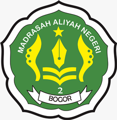 logo oke man 2 bogor